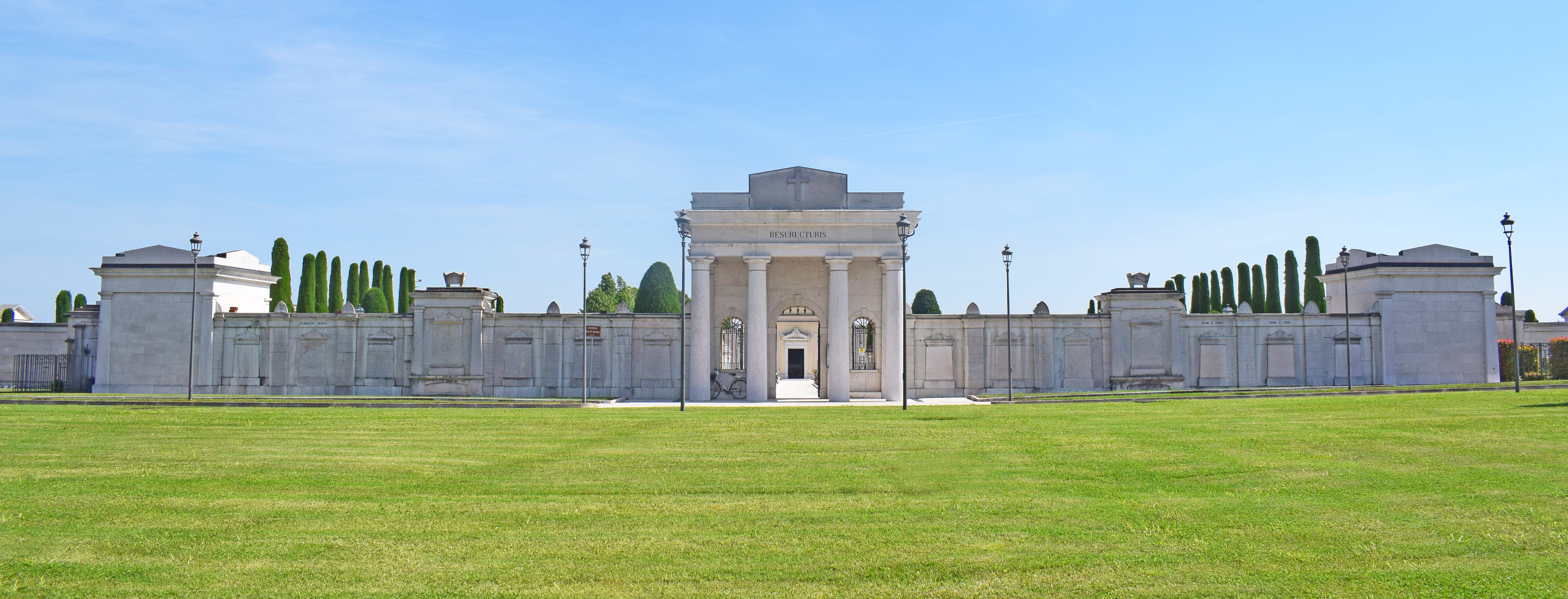 Vista frontale del Cimitero di Travagliato